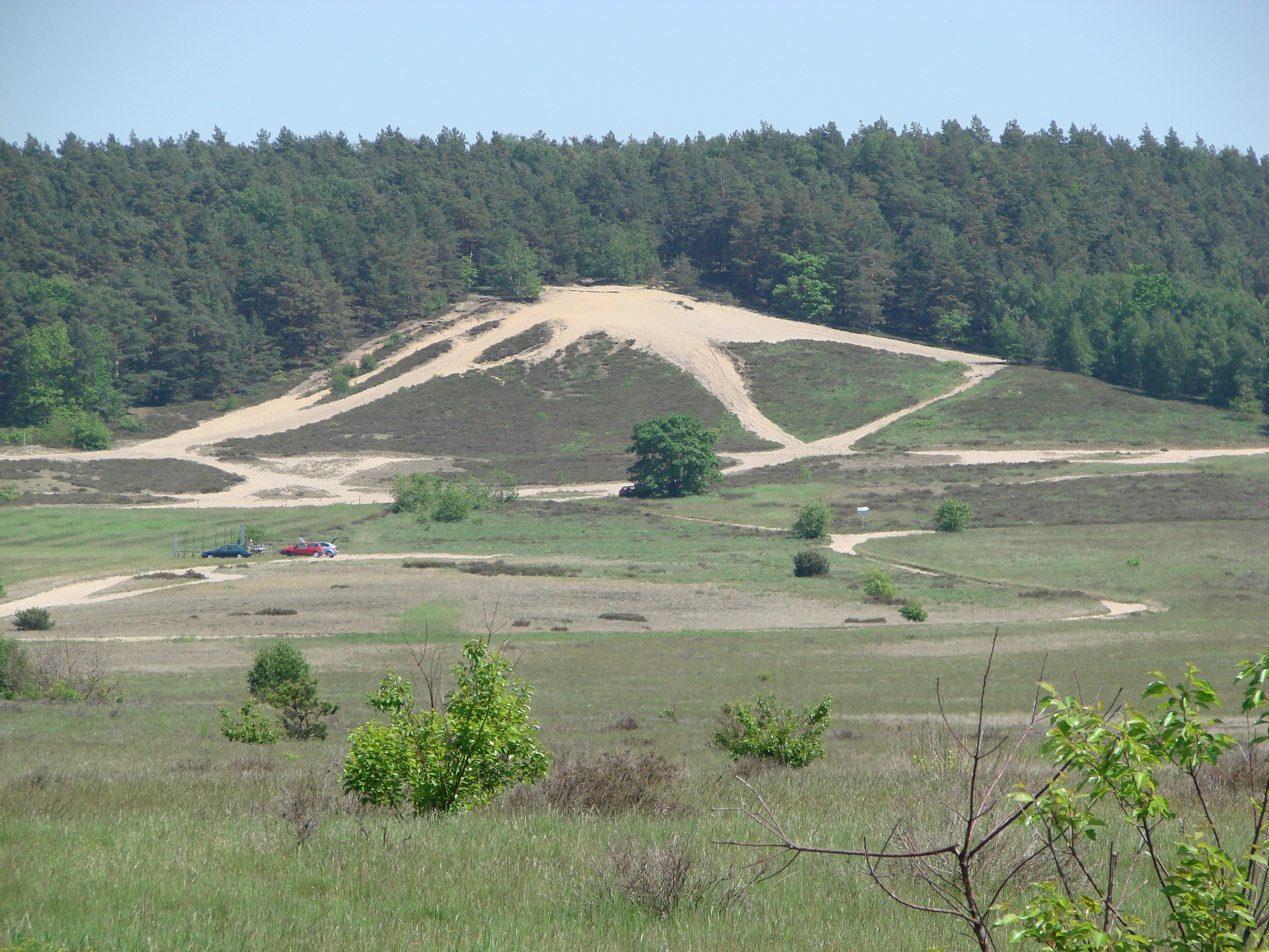 Der Saarmunder Berg gehört zum Saarmunder Endmoränenbogen